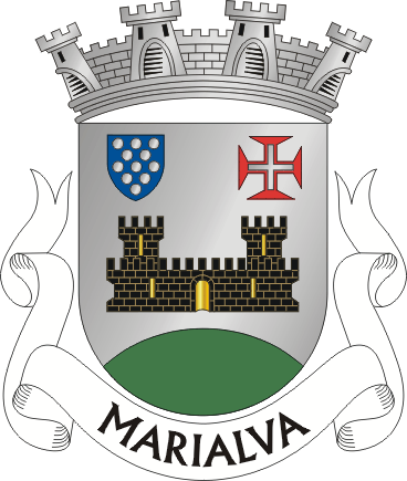 Brasão de Marialva - Mêda (Portugal)